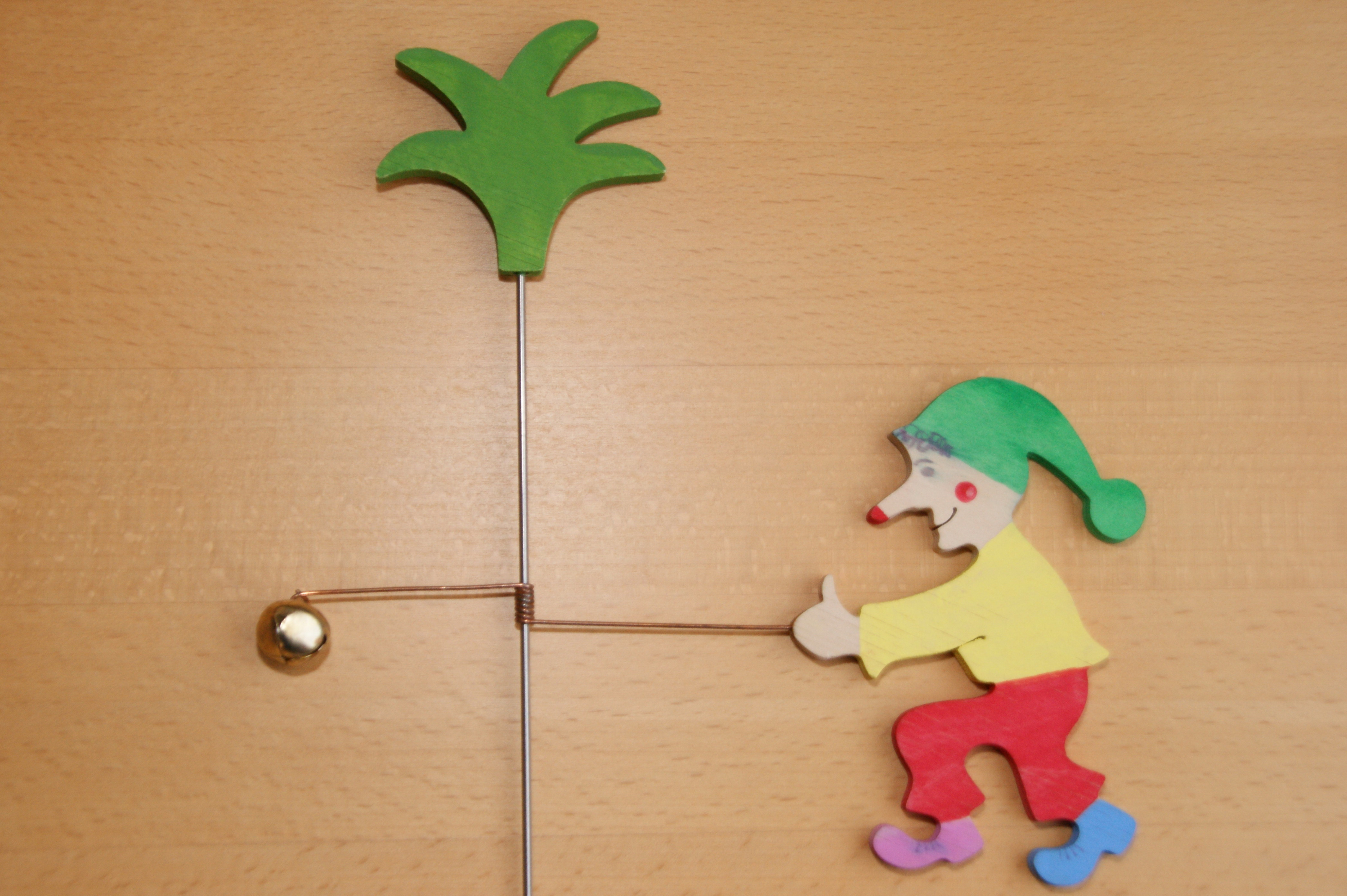 Bamkraxler vom Ostermarkt am Kalvarienberg